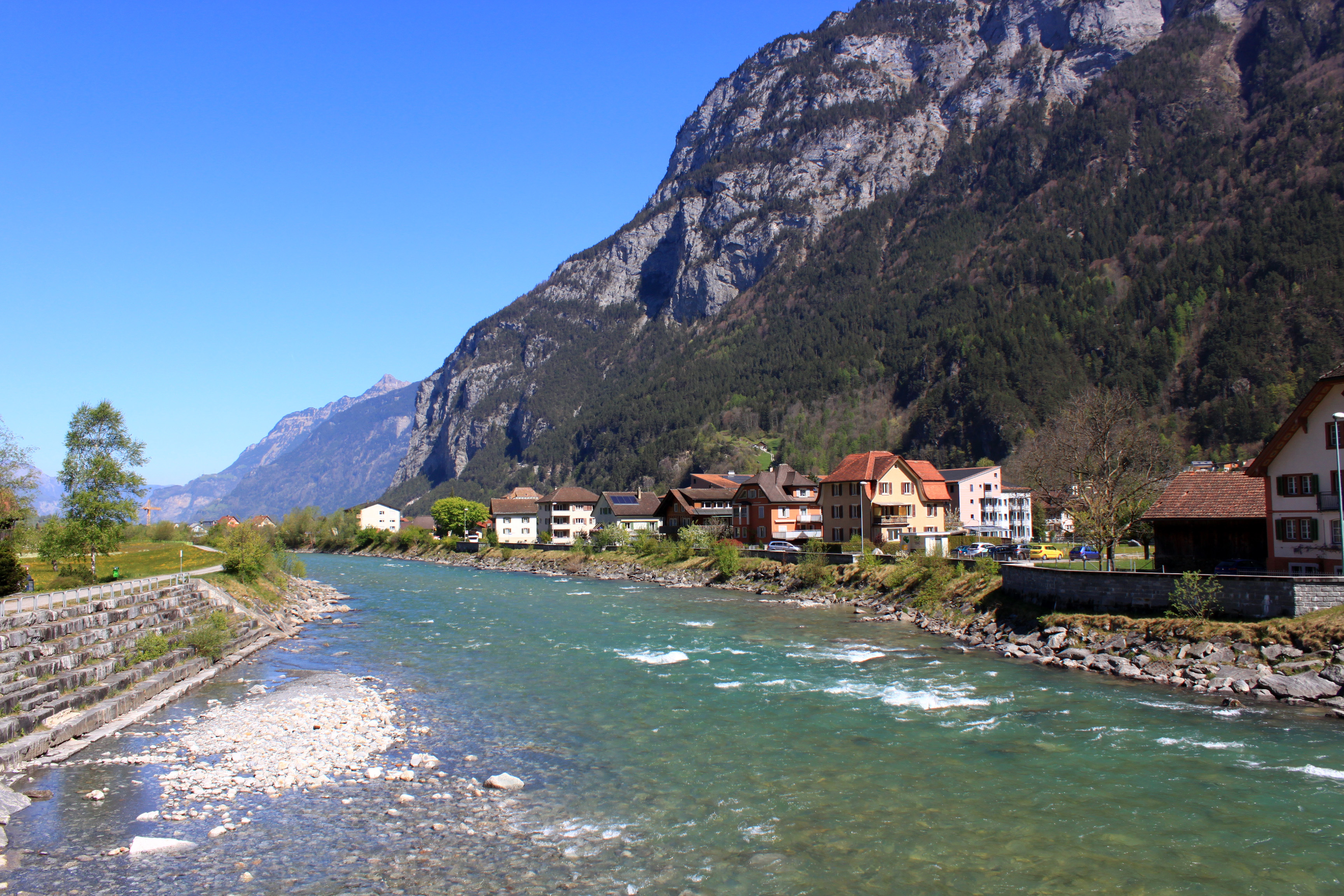 Gemeinde Erstfeld (471 m.ü.M.) im Reusstal im Schweizer Kanton Uri.